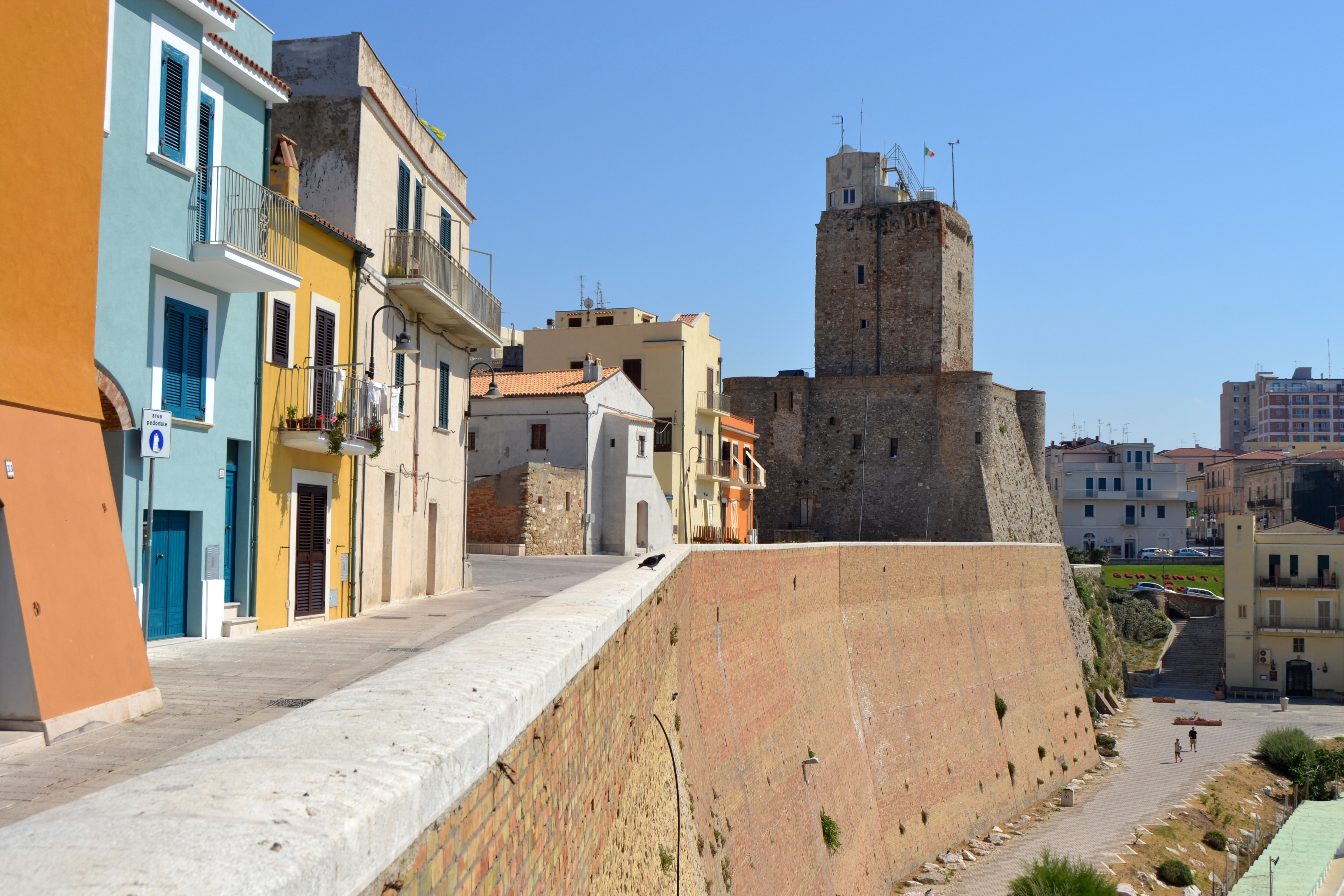 centro di Termoli con castello svevo